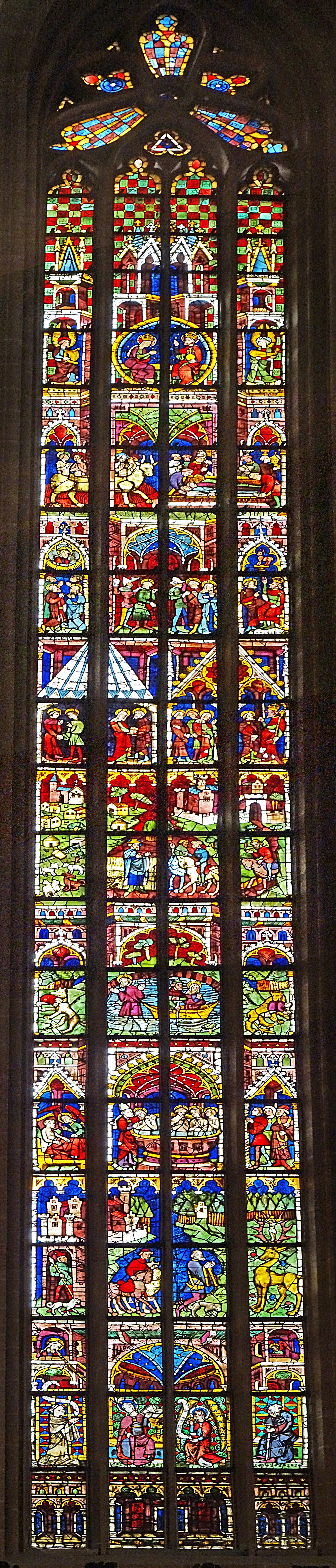 Eustachiusfenster (nVI) im Hohen Chor des Erfurter Doms St. Marien